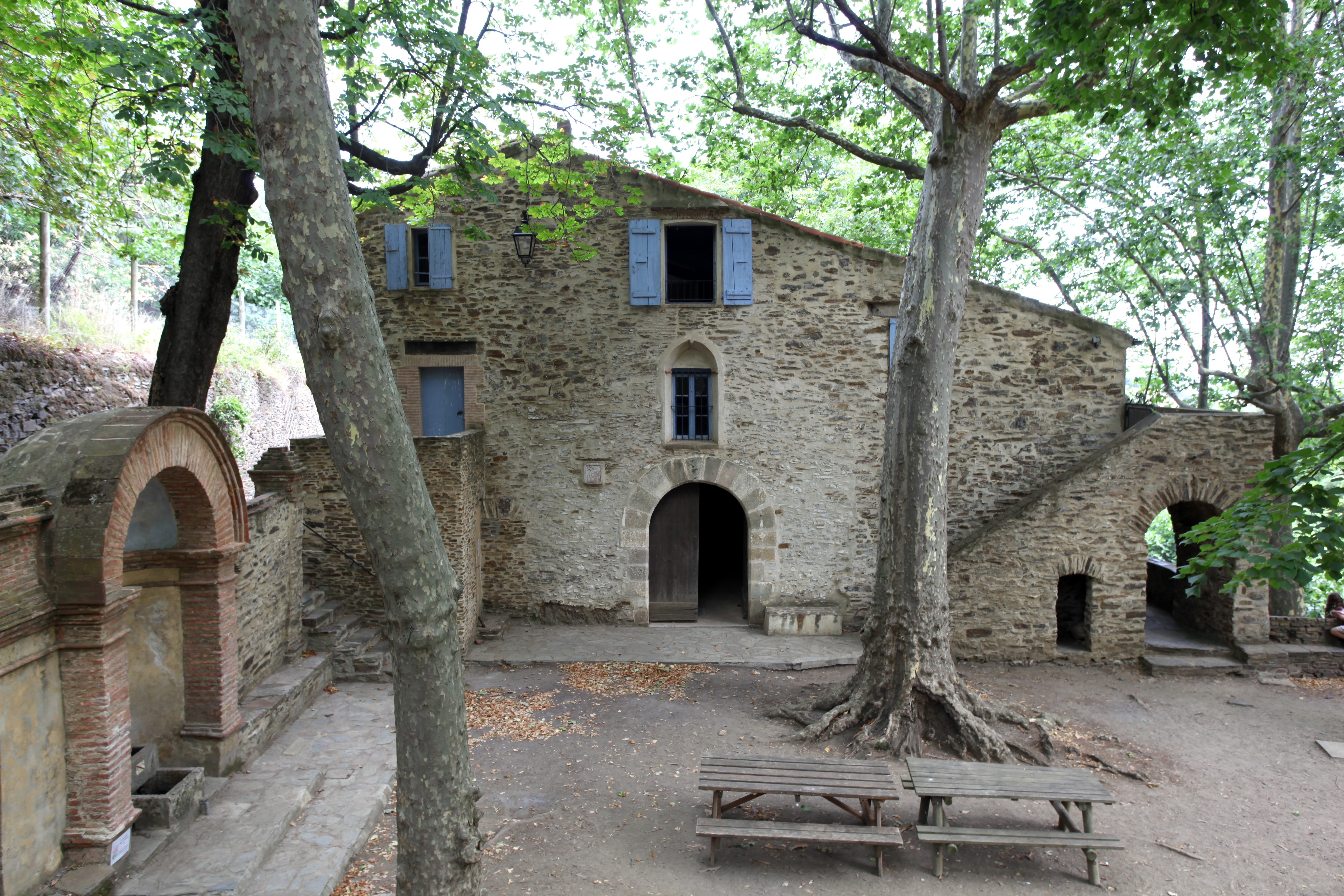 Collioure, Pyrénées Orientales, France. L'ermitage Notre-Dame de Consolation. La cour. Au centre, la porte de la chapelle.